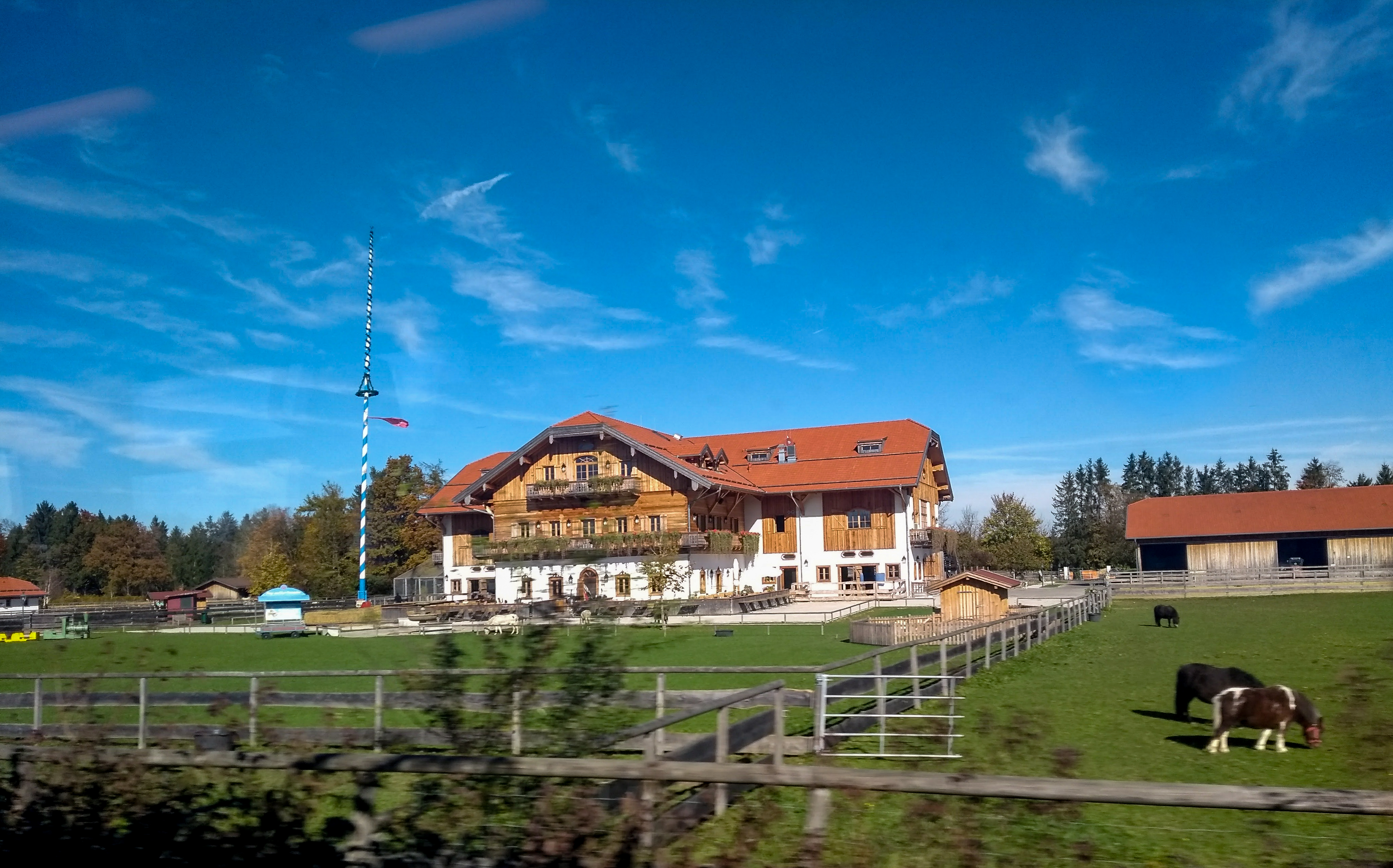 Gut Aiderbichl in Iffeldorf von Westen von einem Zug der Kochelseebahn aus.